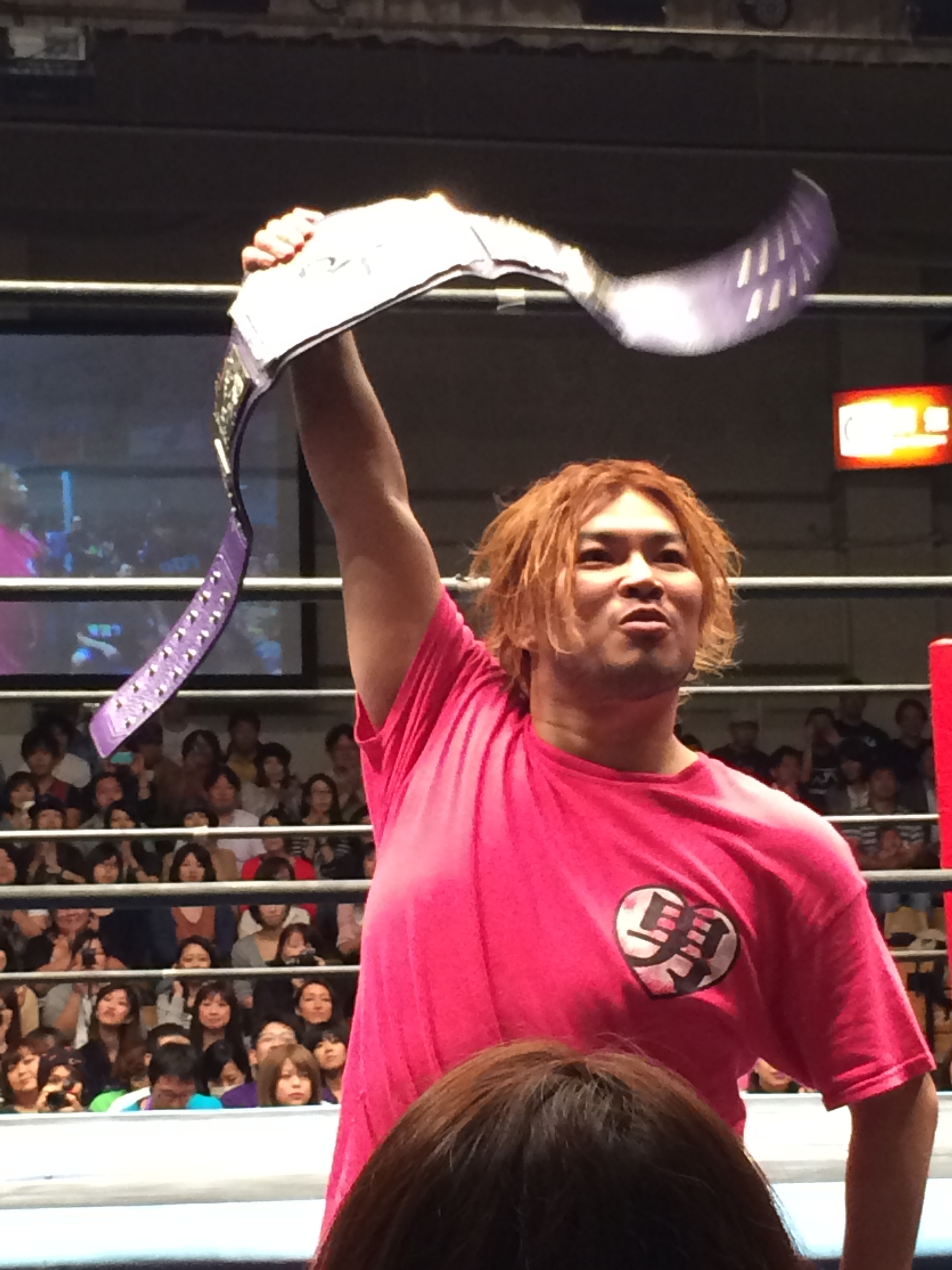 2014年後楽園